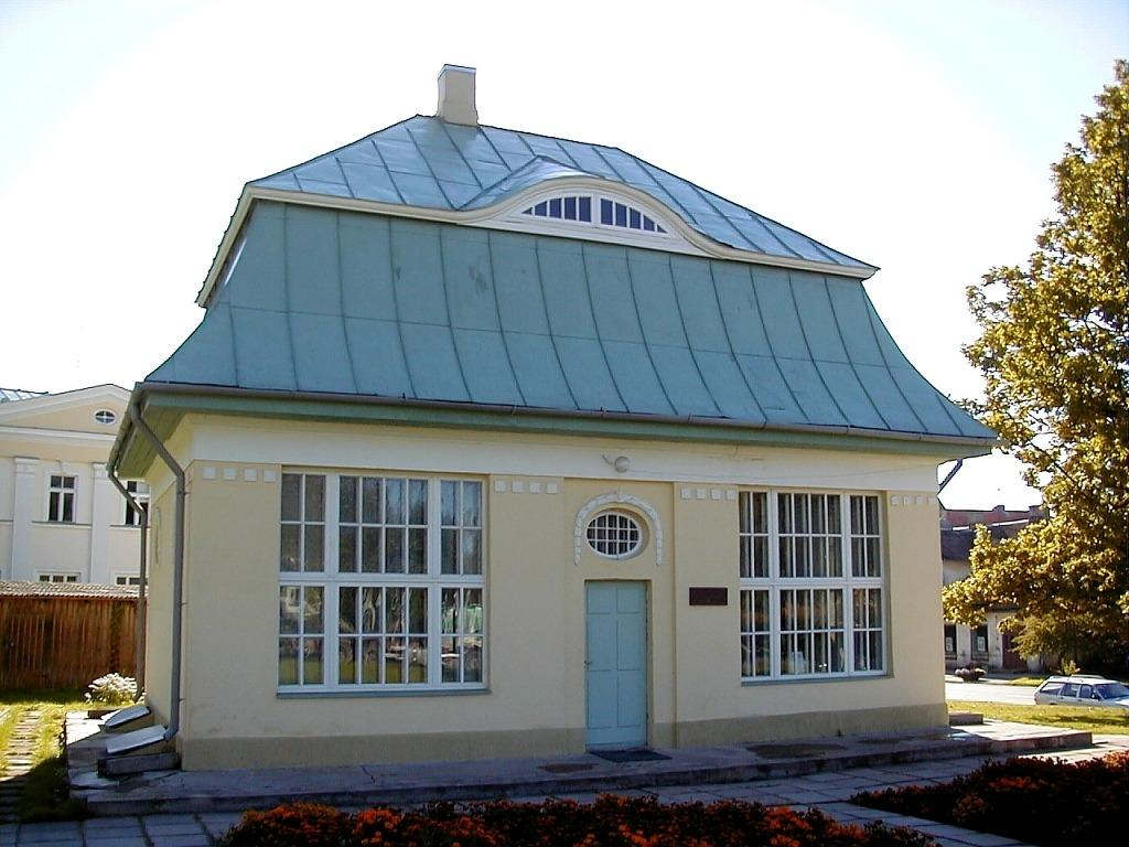 Alūksne, Glika Bībeles muzejs 2000-09-14